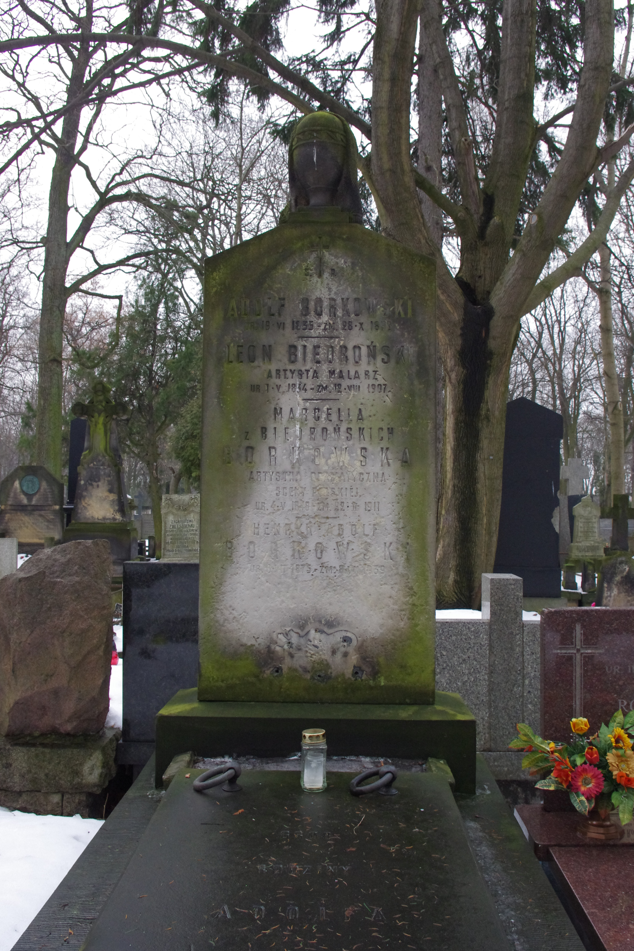 Grób artysty malarza Leona Biedrońskiego (1834-1907) i aktorki dramatycznej Marcelii Biedrońskiej (1948-1911) na Cmentarzu Powązkowskim w Warszawie